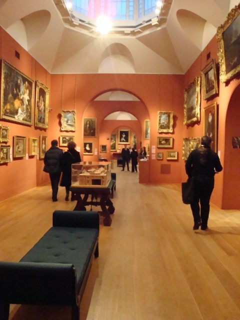 selbst fotografiert